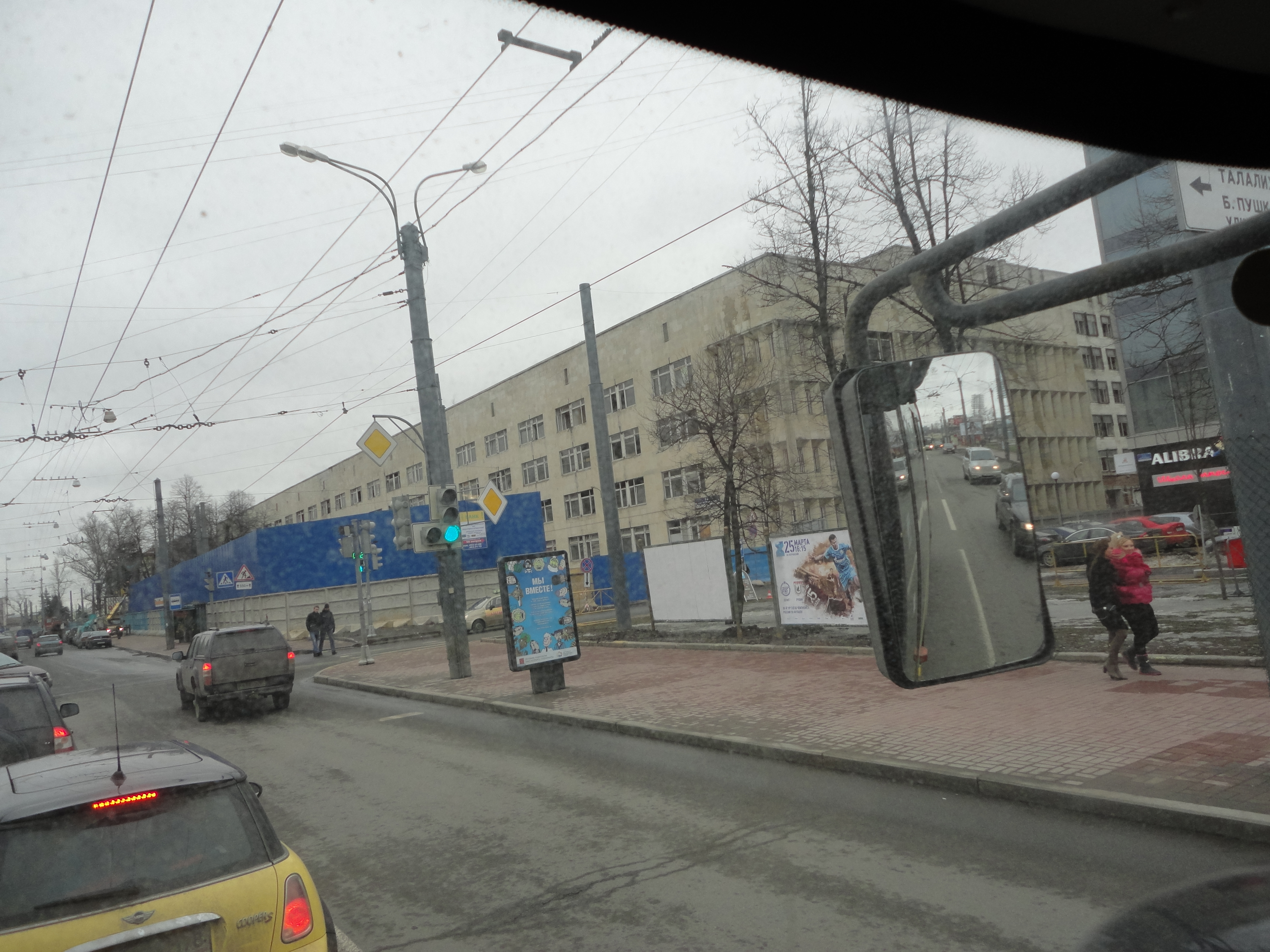 Подготовка проекта застройки территории "Набережная Европы" - готовится к сносу здание Государственного института прикладной химии (новое официальное название - Российский научный центр «Прикладная химия»). Снимок сделан вдоль проспекта Добролюбова, справа продолжение переулка Талалихина к берегу Малой Невы. Перед зданием ставят синий строительный забор для последующего демонтажа здания